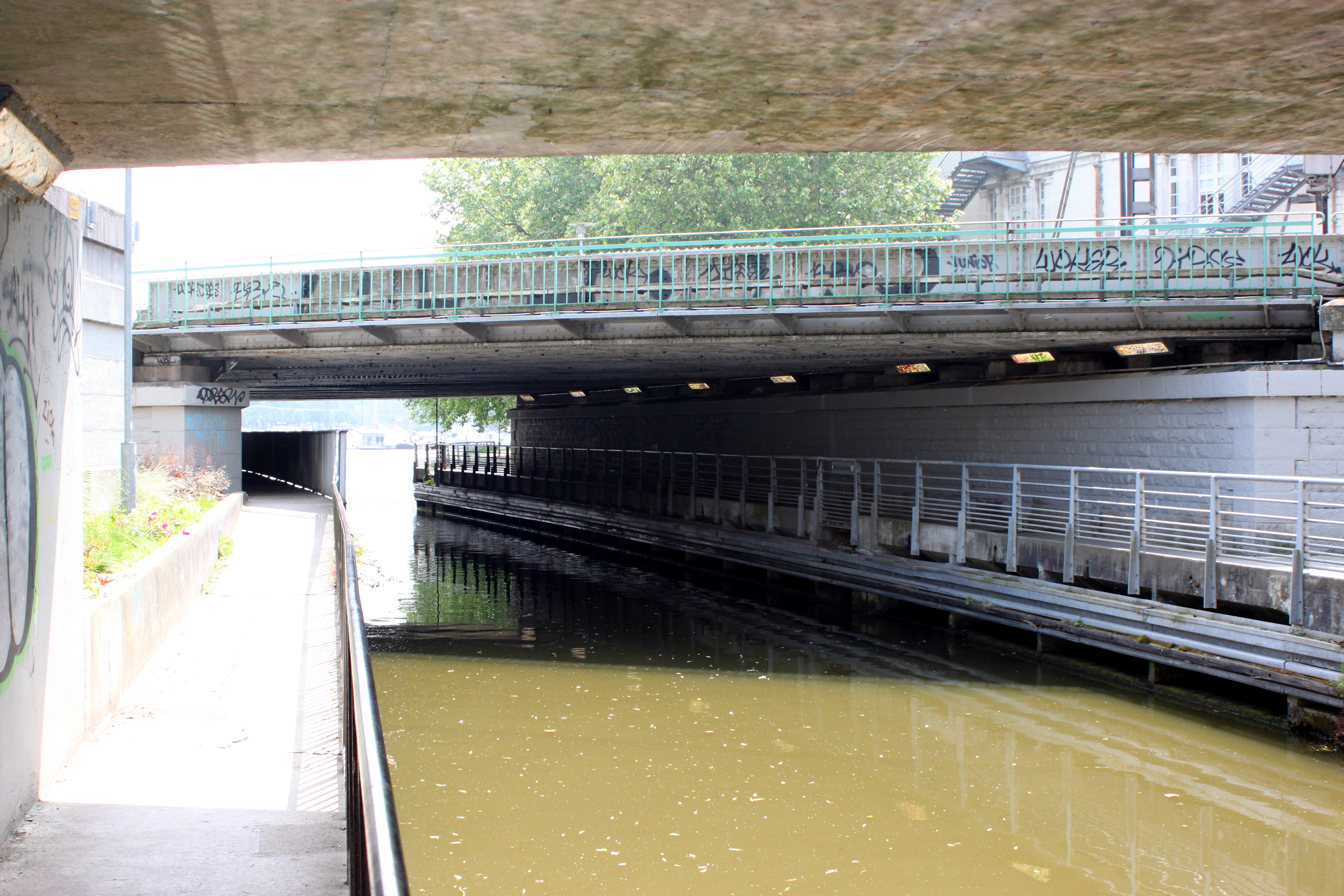 Sortie du tunnel sous le pont du quai Malakoff, vers le port du canal Saint-Félix, Fr-44-Nantes.